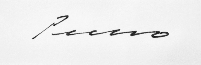 Assinatura que utiliza nos desenhos.